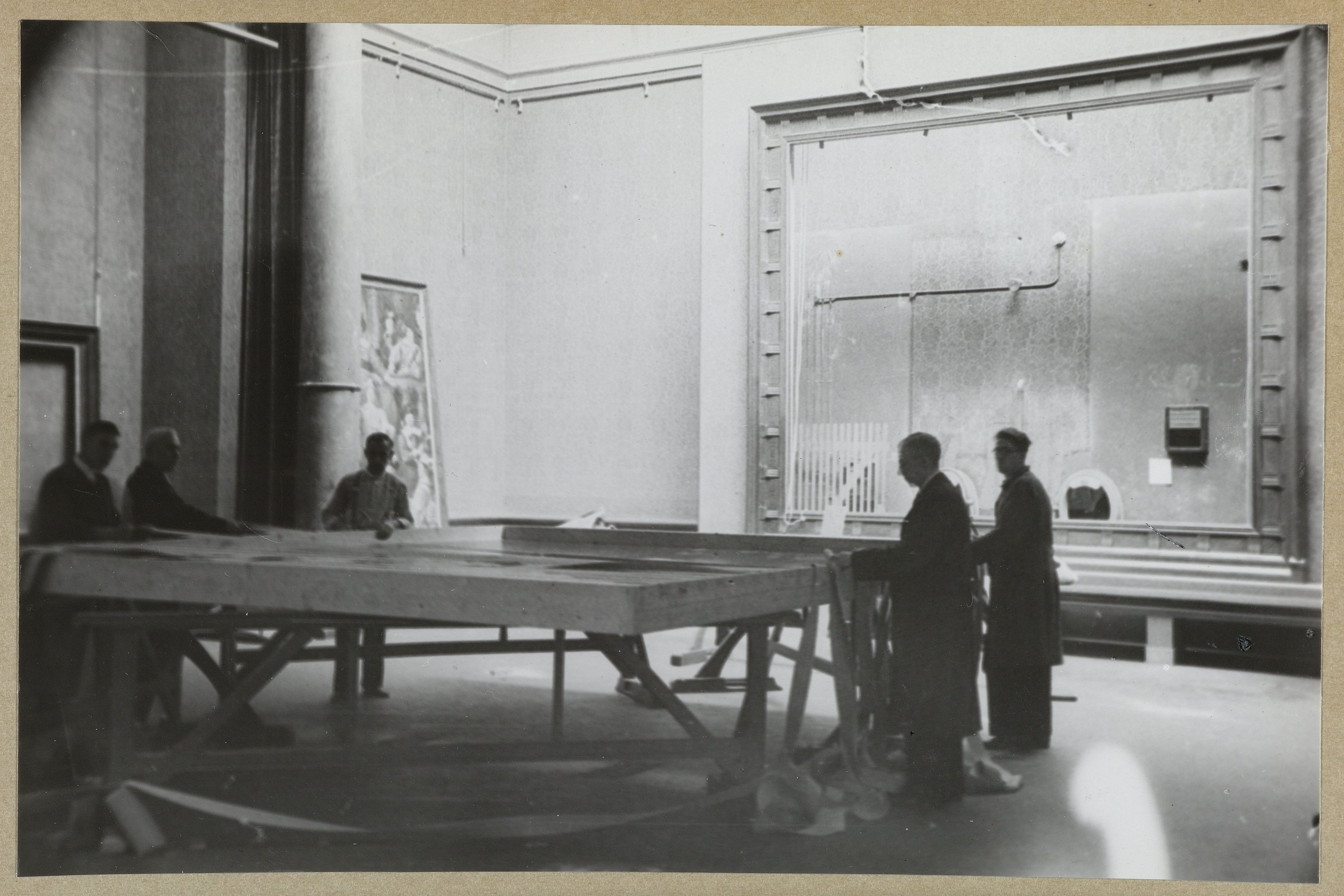 De lijst hangt leeg aan de westwand van de erezaal. Mannen zekeren de Nachtwacht in een horizontale bekisting. In 1939 vond evacuatie van veel zaken plaats in verband met oorlogsdreiging. Het museum werd gesloten.